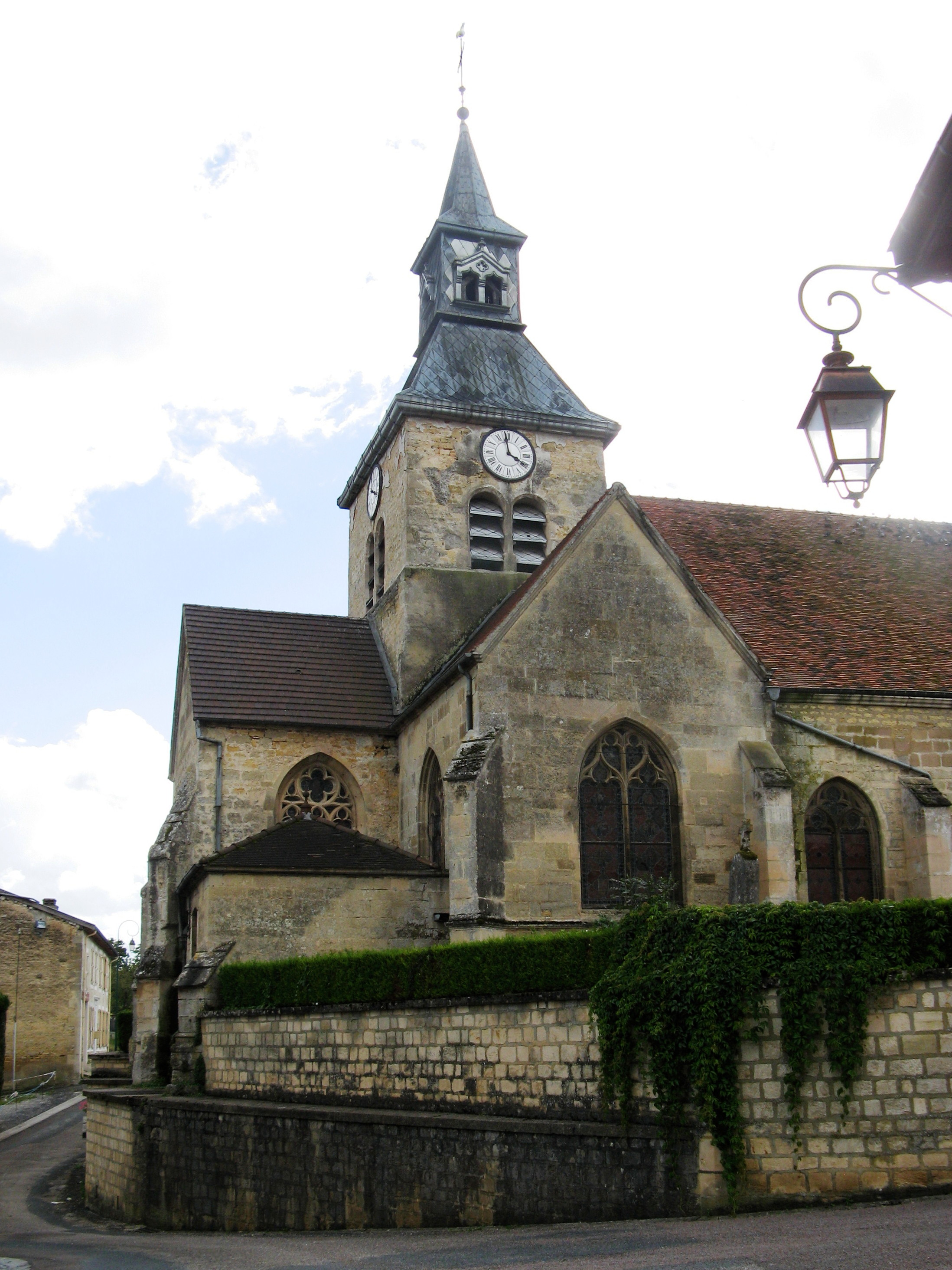 Doulevant-le-Château, transept nord de l'église Saint-Louvent. .